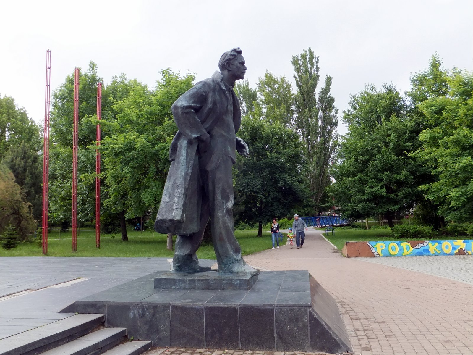 Elenšel